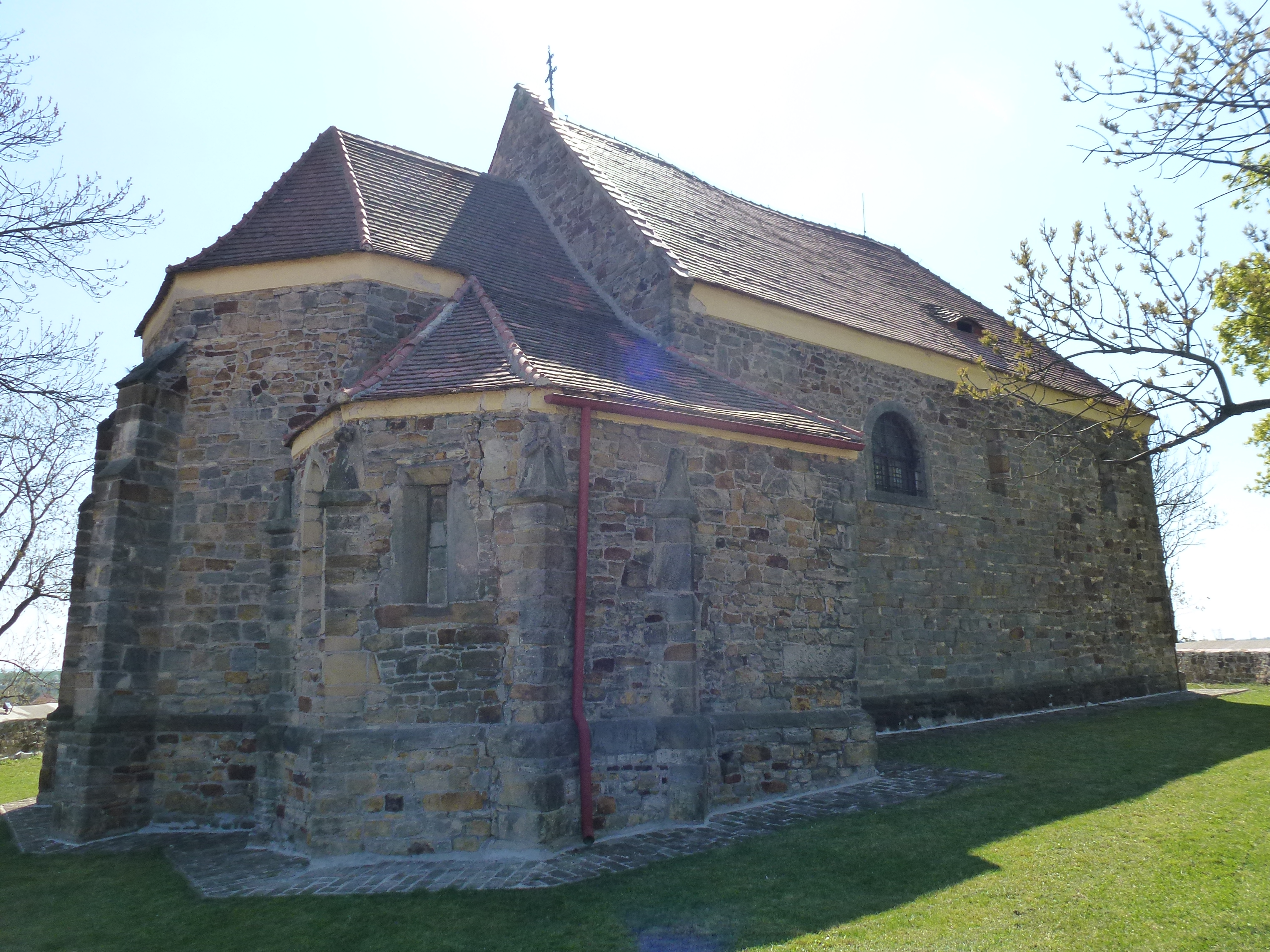 Exterier